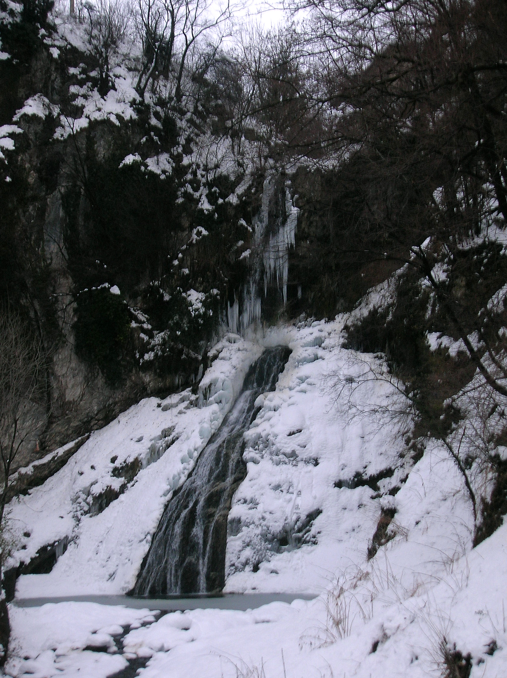 cascata del torrente Vallategna, ad Asso, affluente del fiume Lambro